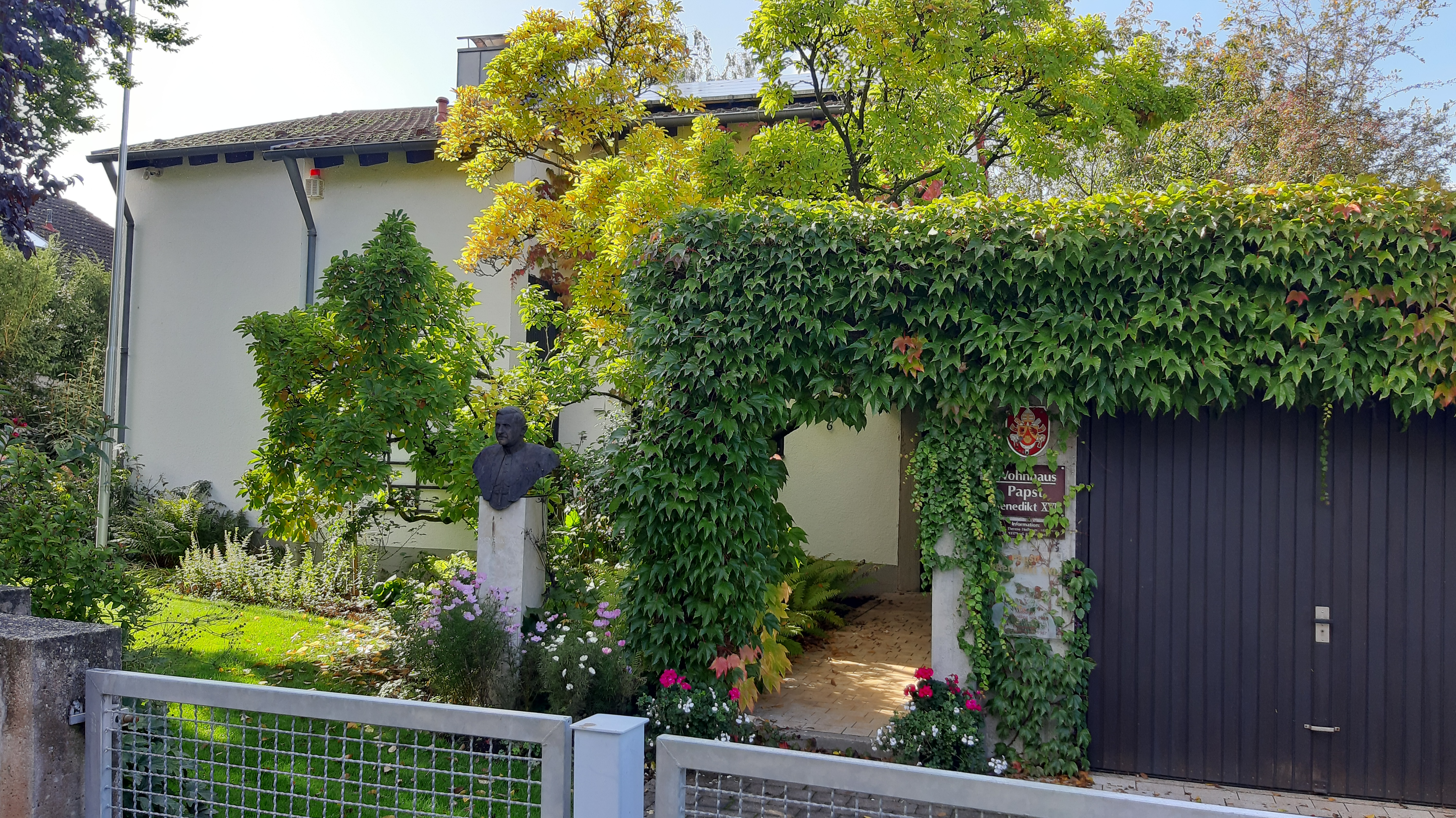 Das ehemalige Wohnhaus von Prof. Dr. Joseph Ratzinger, dem späteren Papst Benedikt XVI. in der Bergstraße 6, 93080 Pentling. Seit 2010 im Besitz der Stiftung Papst Benedikt XVI. Seit 2012 Ort der Begegnung und Dokumentation.